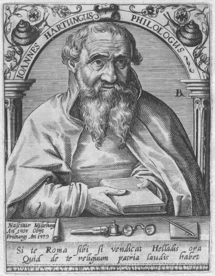 Gräzist und Hebraist Johann Hartung (1505-1579), Kupferstich von Robert Boissard, Bild: 138x106, Platte: 140x107, aus Jean Jacques Boissard: Icones et effigies virorum doctorum quotquotcelebres fuerunt per Europam. - 1645. - Bl. [57]